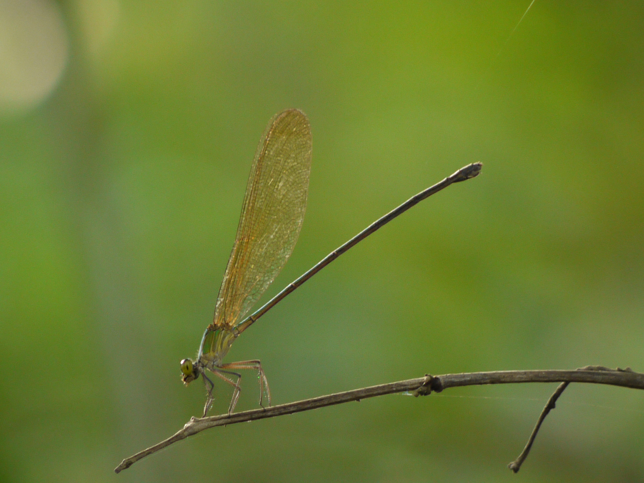 Vestalis gracilis female